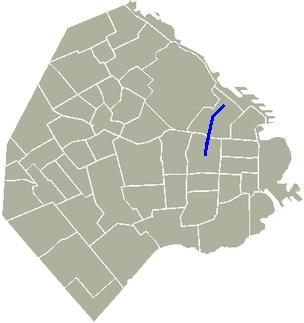 Avenida Pueyrredón, Bs As